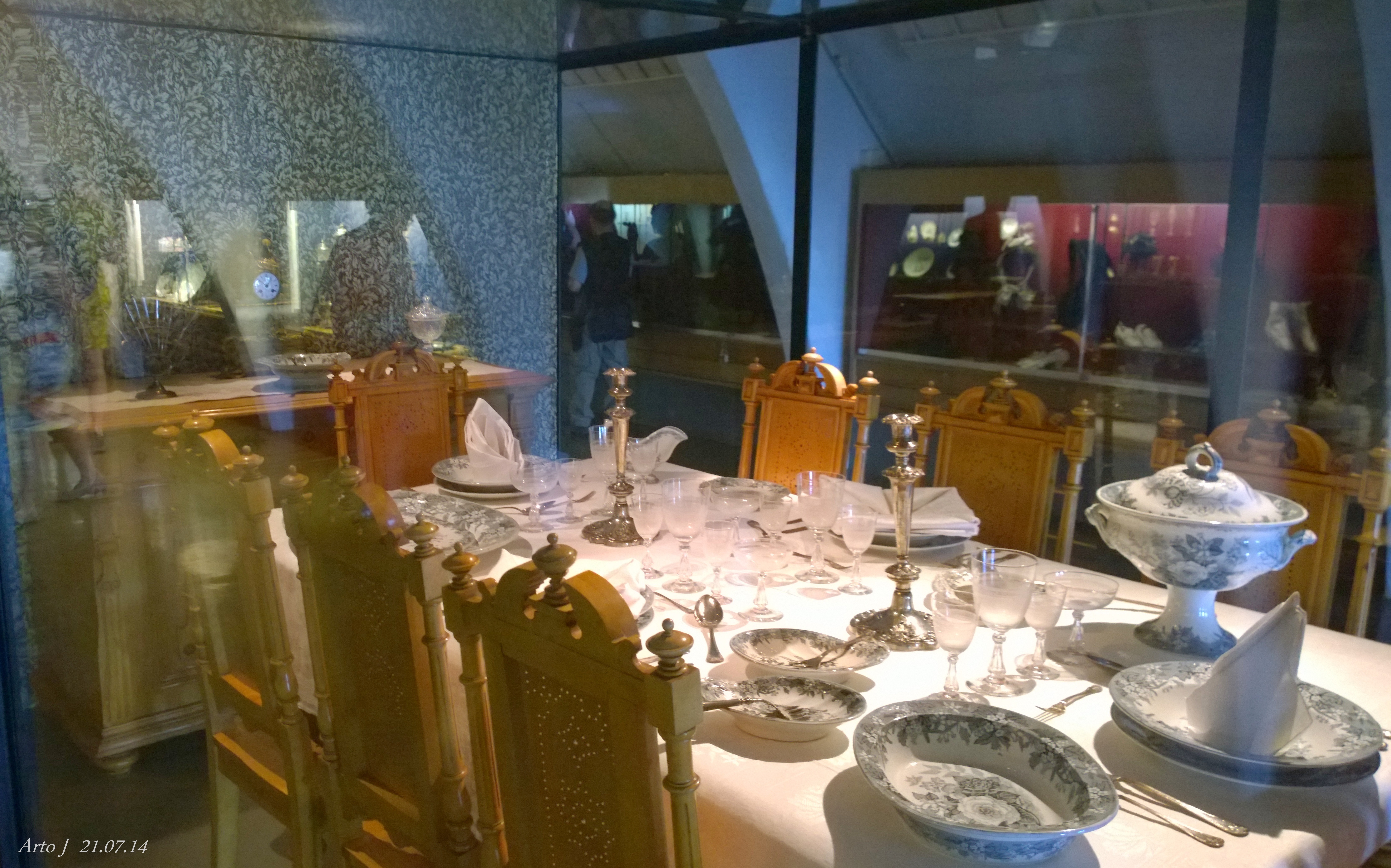 Turku's Castle